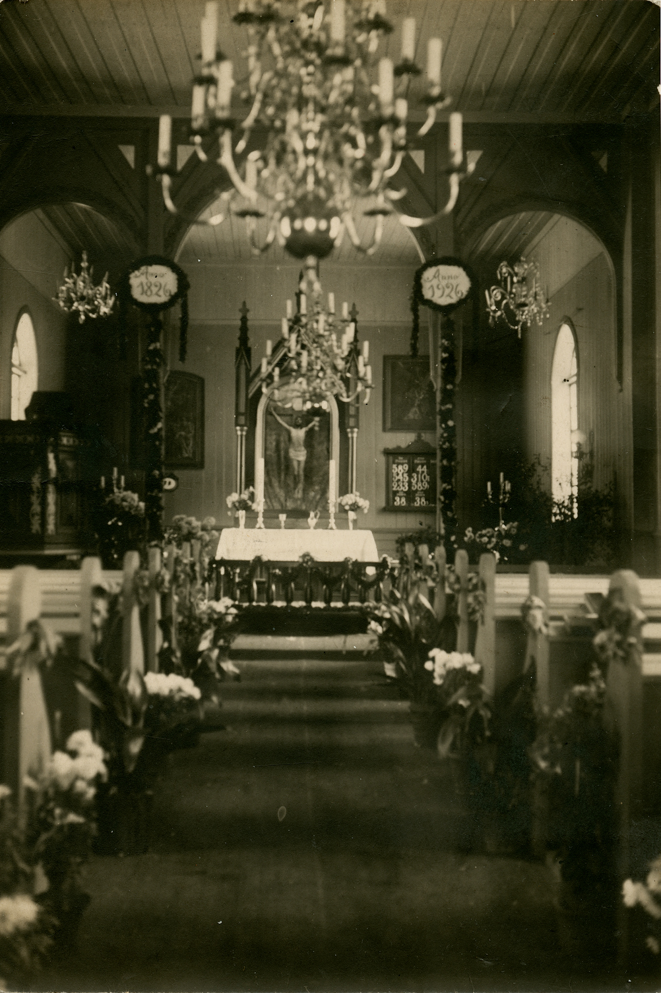 Interiør i Nordby kirke (1926). Fra Kulturminnebilder.no.